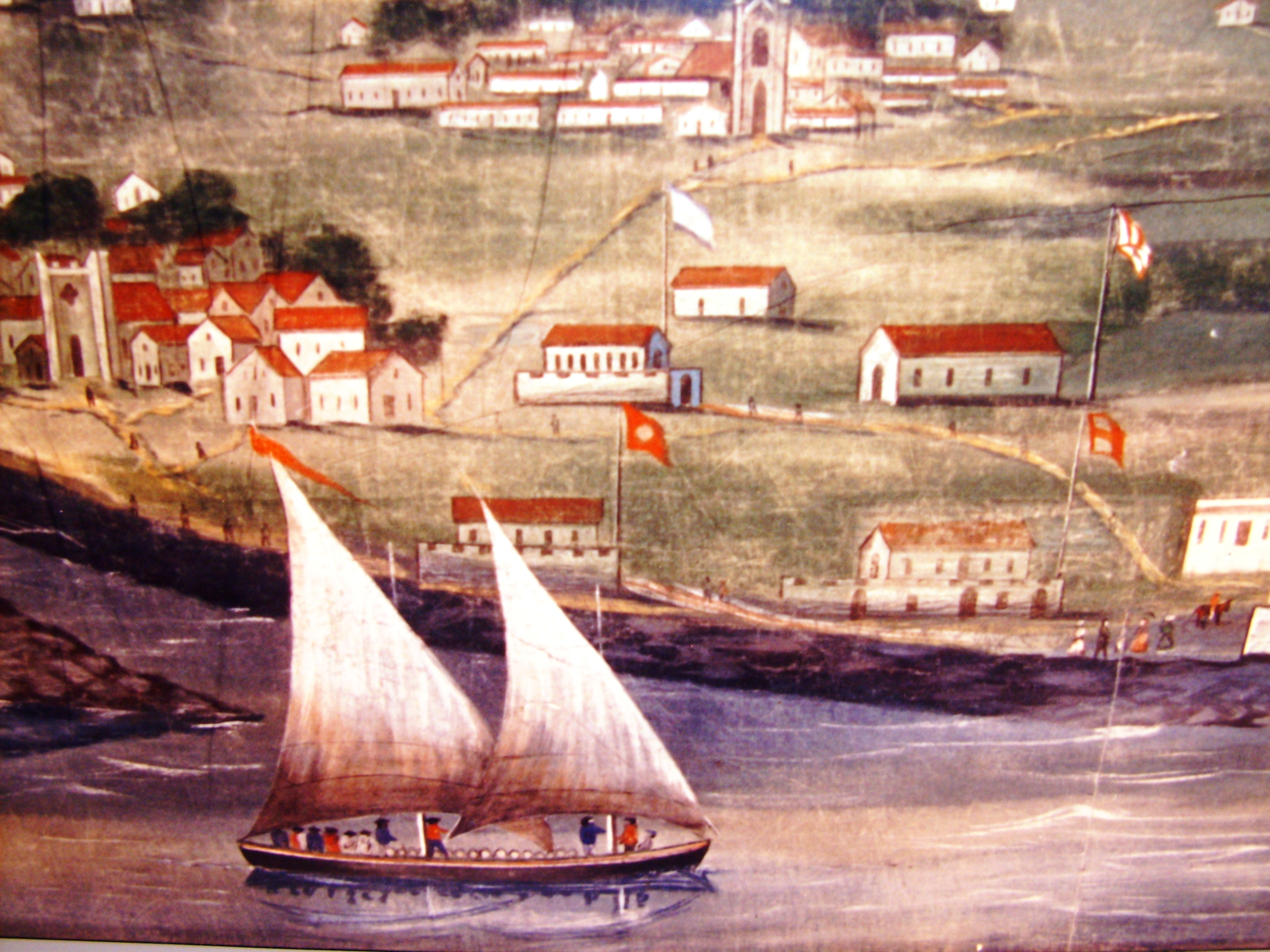 Ilha do Pico (detalhe). Benjamin Russell & Caleb Purrington. "Whaling Voyage 'Round the World". ca.1848. New Bedford Whaling Museum. in Museu dos Baleiros, Lajes do Pico: detalhe mostrando o forte de Santa Catarina.